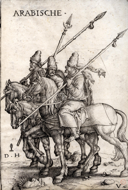 Hopfer, Daniel (ca 1470-1536): Drei arabische Lanzenreiter. Radierung, etching. 23 x 15,8 cm. B. 60, Hollstein 68 I (von II). Ausgezeichneter, sehr schön klarer Druck mit feinem Rändchen. Vor der Funck-Nummer. Verschiedene dünne, teils hinterlegte Stellen im Papier, verso etwas fleckig, sonst gut erhaltenes Exemplar.